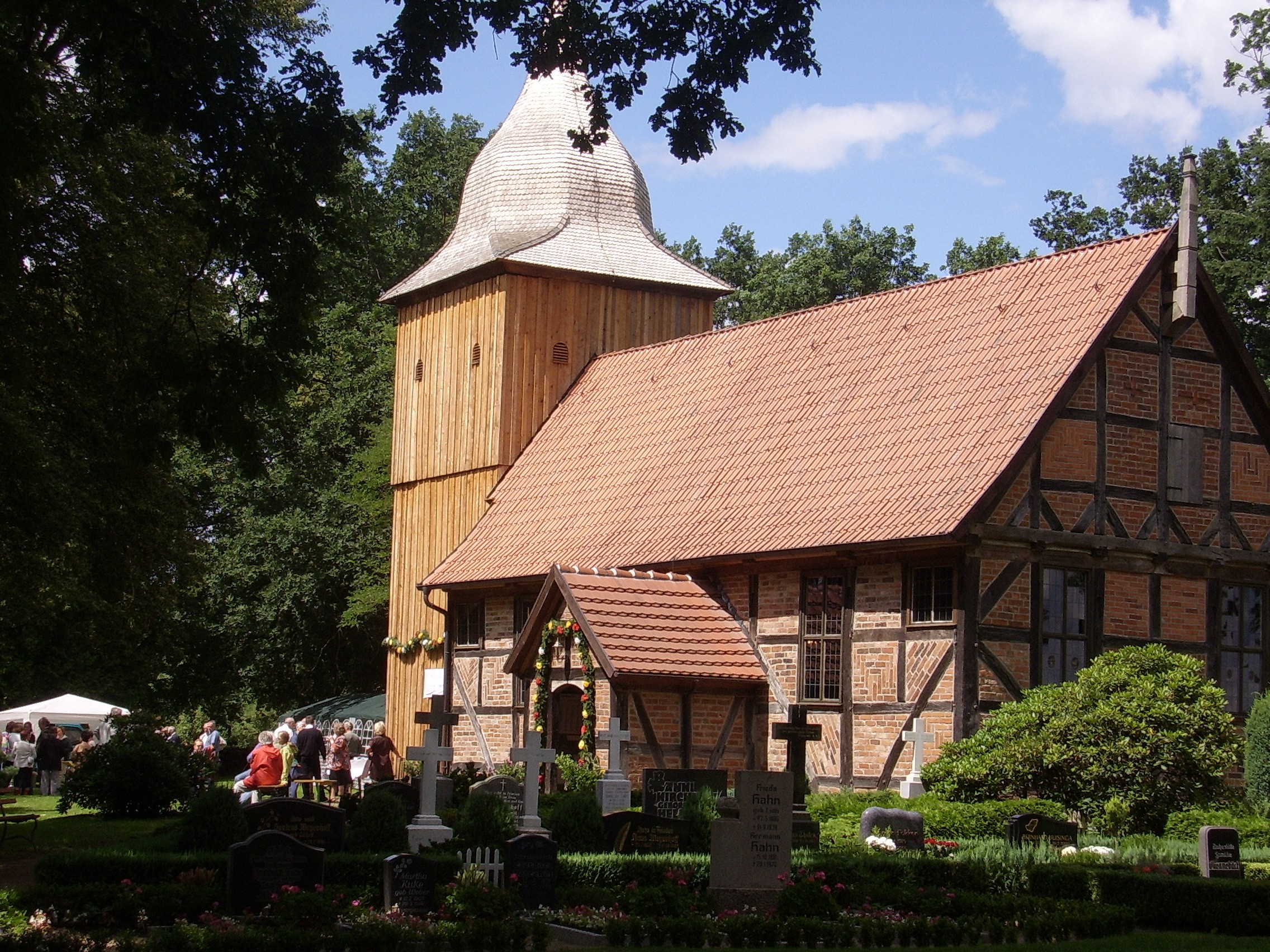 Sanierte Fachwerkkirche in Dammwolde